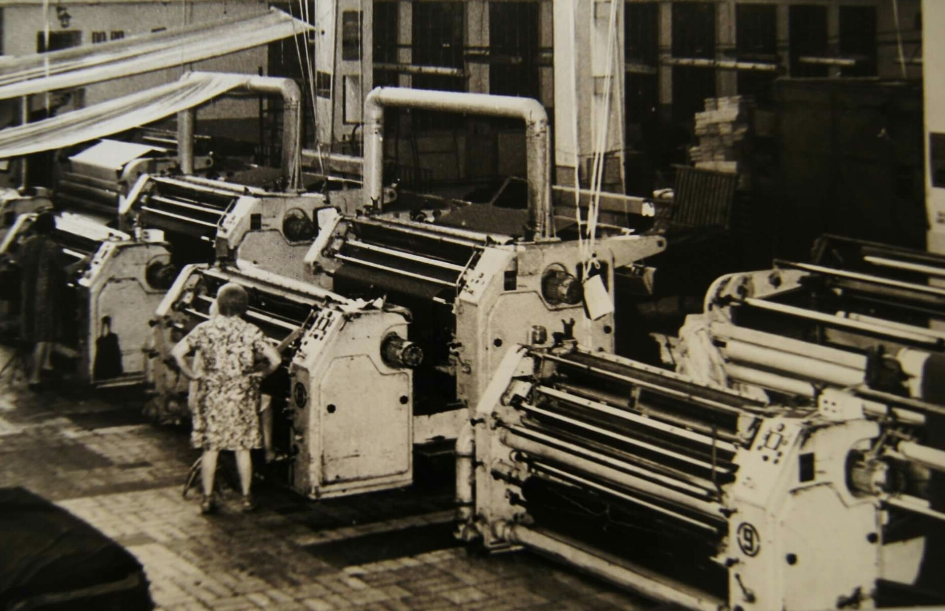 Hala produkcyjna zakładów przemysłu wełnianiego Tomtex w Tomaszowie Mazowieckim, przełom lat 70. i 80. XX wieku